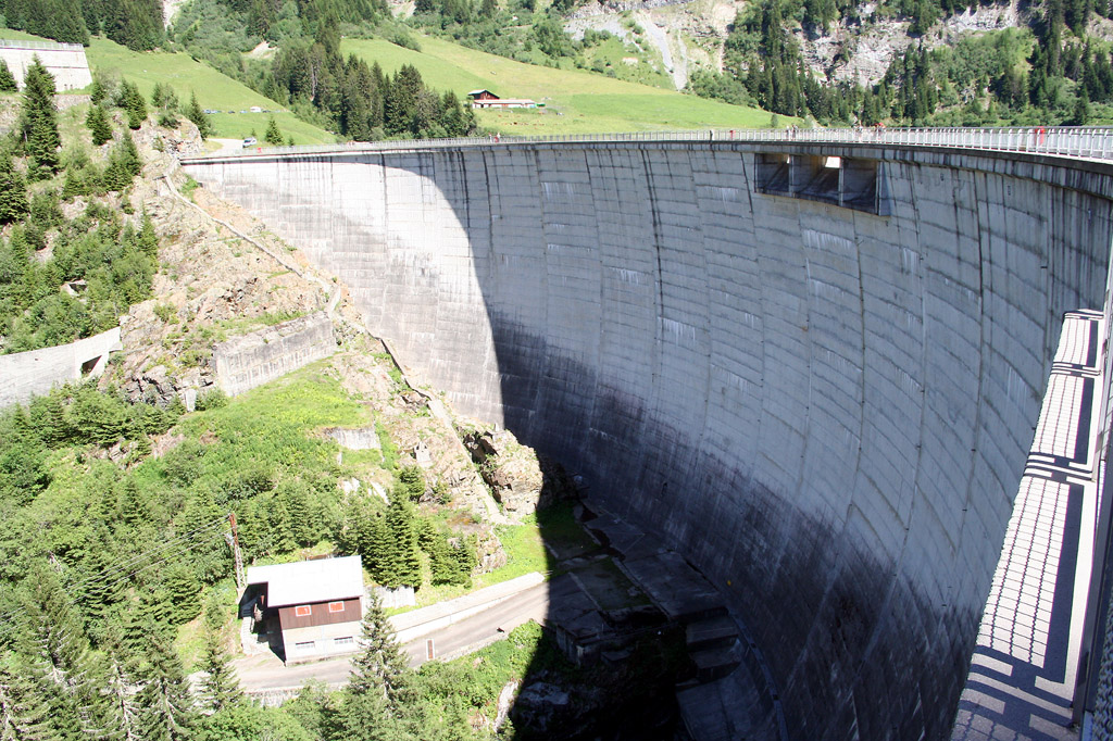 Le Barrage du Guérin